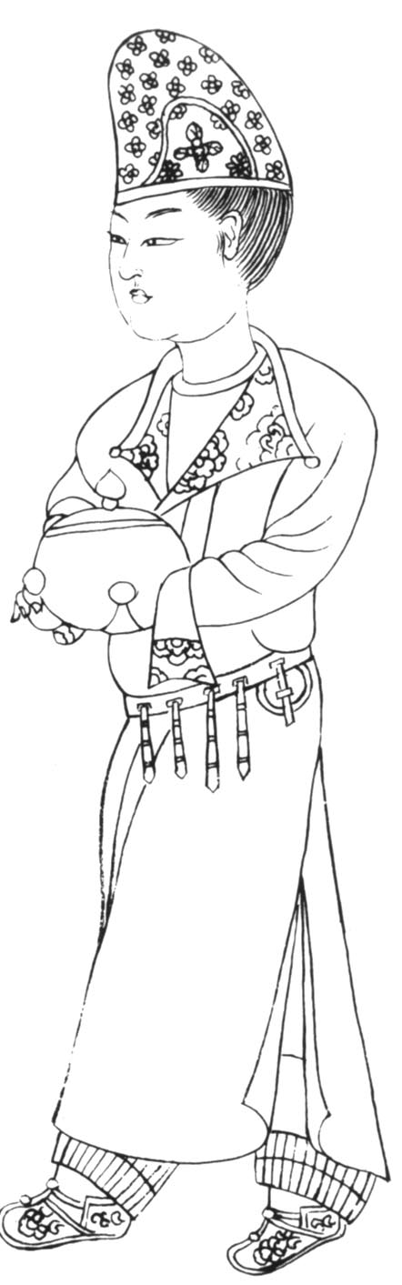 穿翻领胡服、戴胡帽、佩蹀躞带的妇女（陕西西安出土石刻摹本）